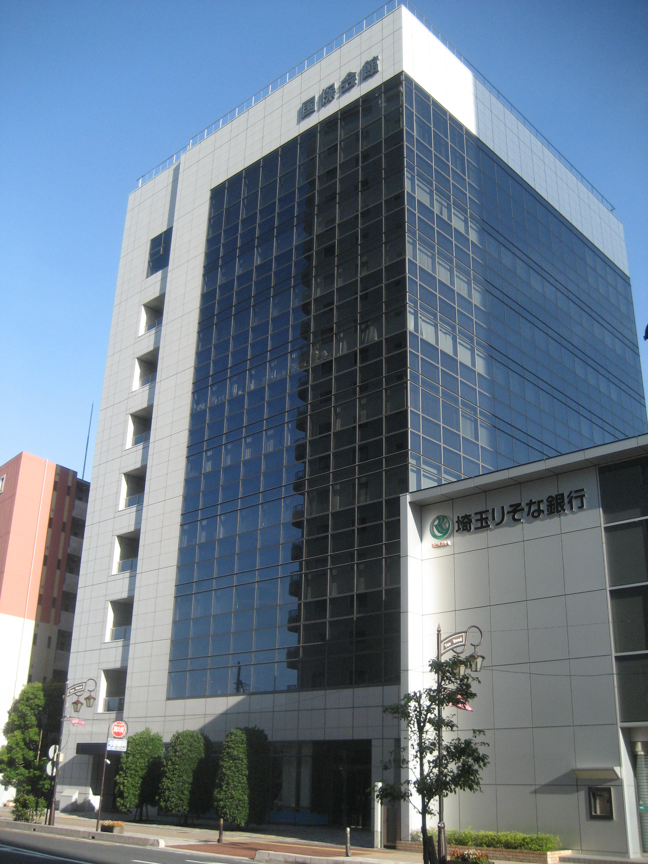 埼玉県さいたま市中央区にある国保会館